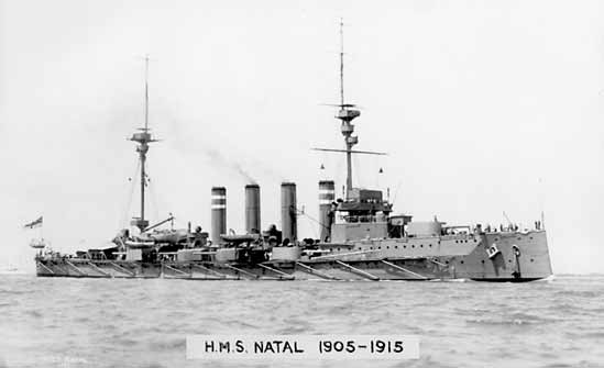 HMS Natal